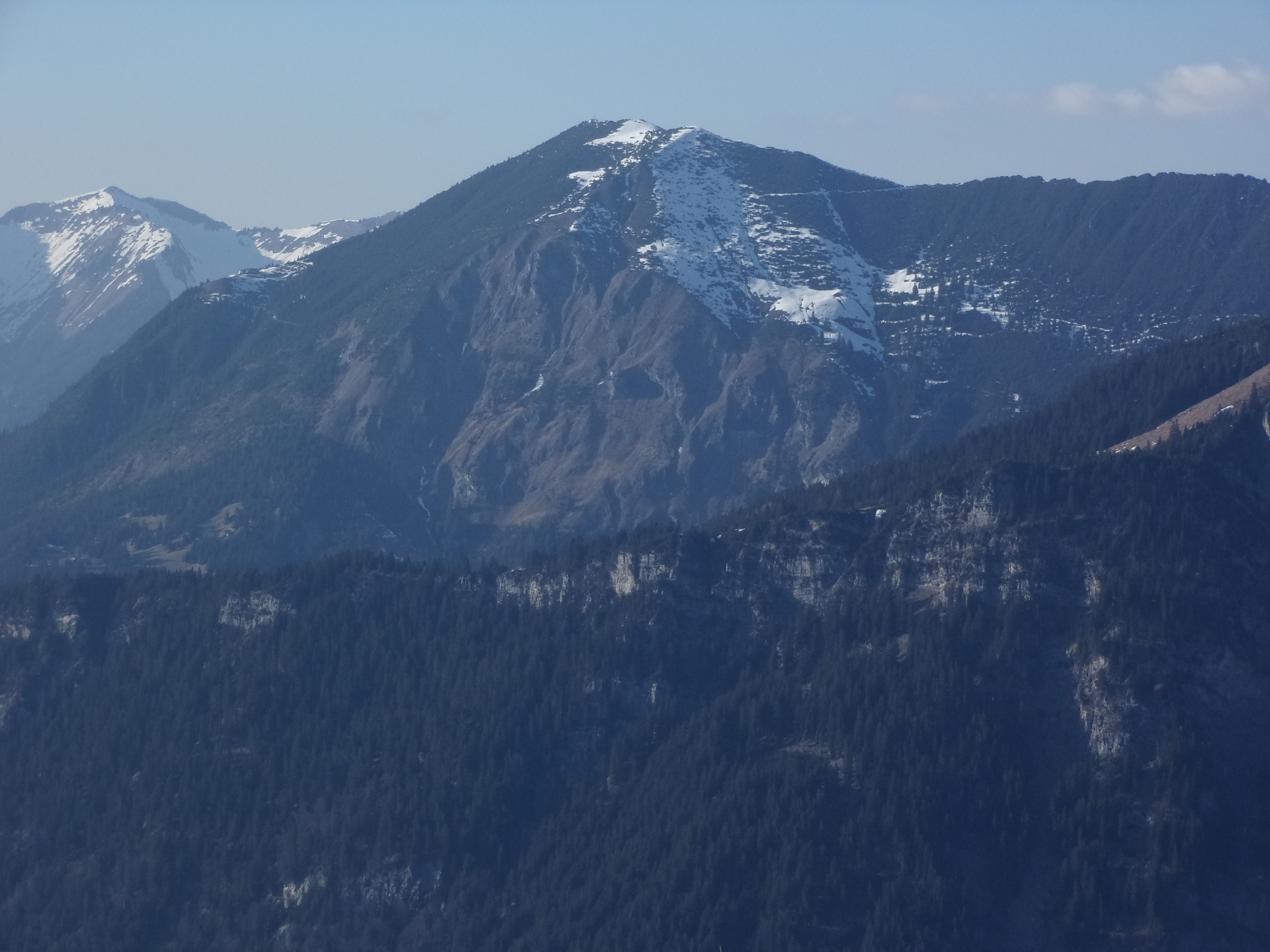 Hoher Fraßen von Süden. Links auf einem Absatz die Fraßenhütte. Im Vordergrund die Katzenköpfe.